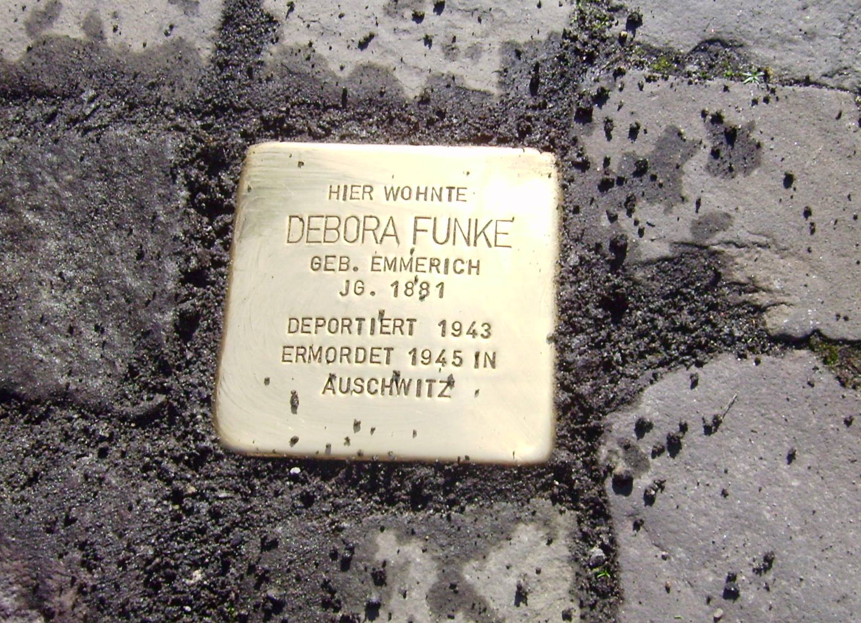 Stolperstein in Arnsberg, Steinweg 12 zur Erinnerung an "Debora Funke geb. Emmerich Jg. 1881 deportiert 1943 ermordet 1945 in Auschwitz" (siehe Gedenkbuch des Bundesarchivs [1])